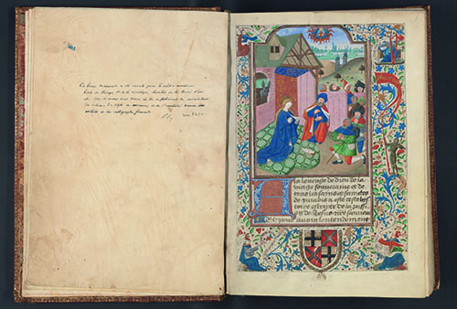 Philippe de Mazerolles, Vie et Passion de Notre Seigneur Jésus-Christ (Gruuthuse manuscript), 1460, verlucht manuscript op perkament, 309 x 227 x 51 mm.